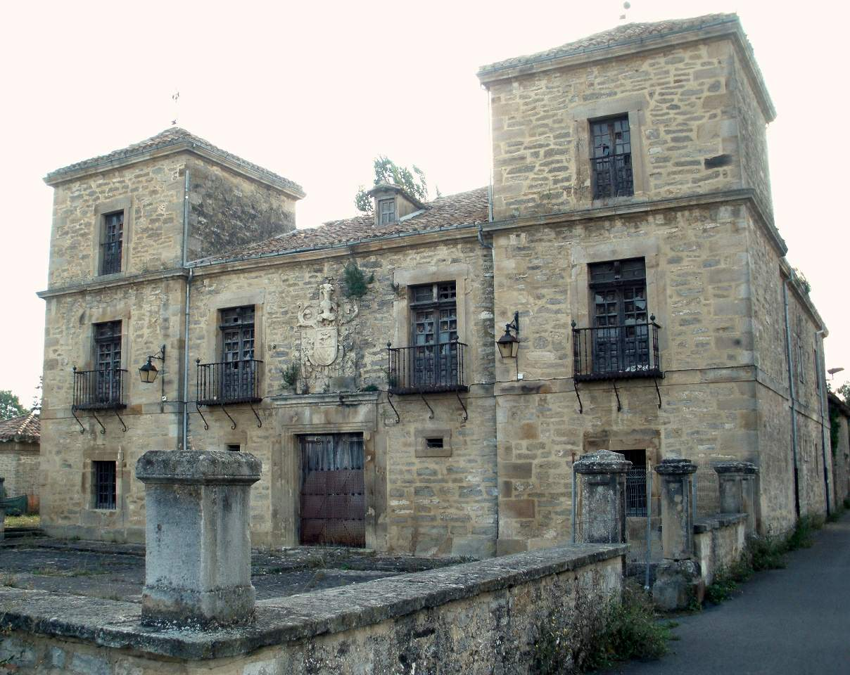 Palacio Otálora-Guevara, en Zurbano (Álava)